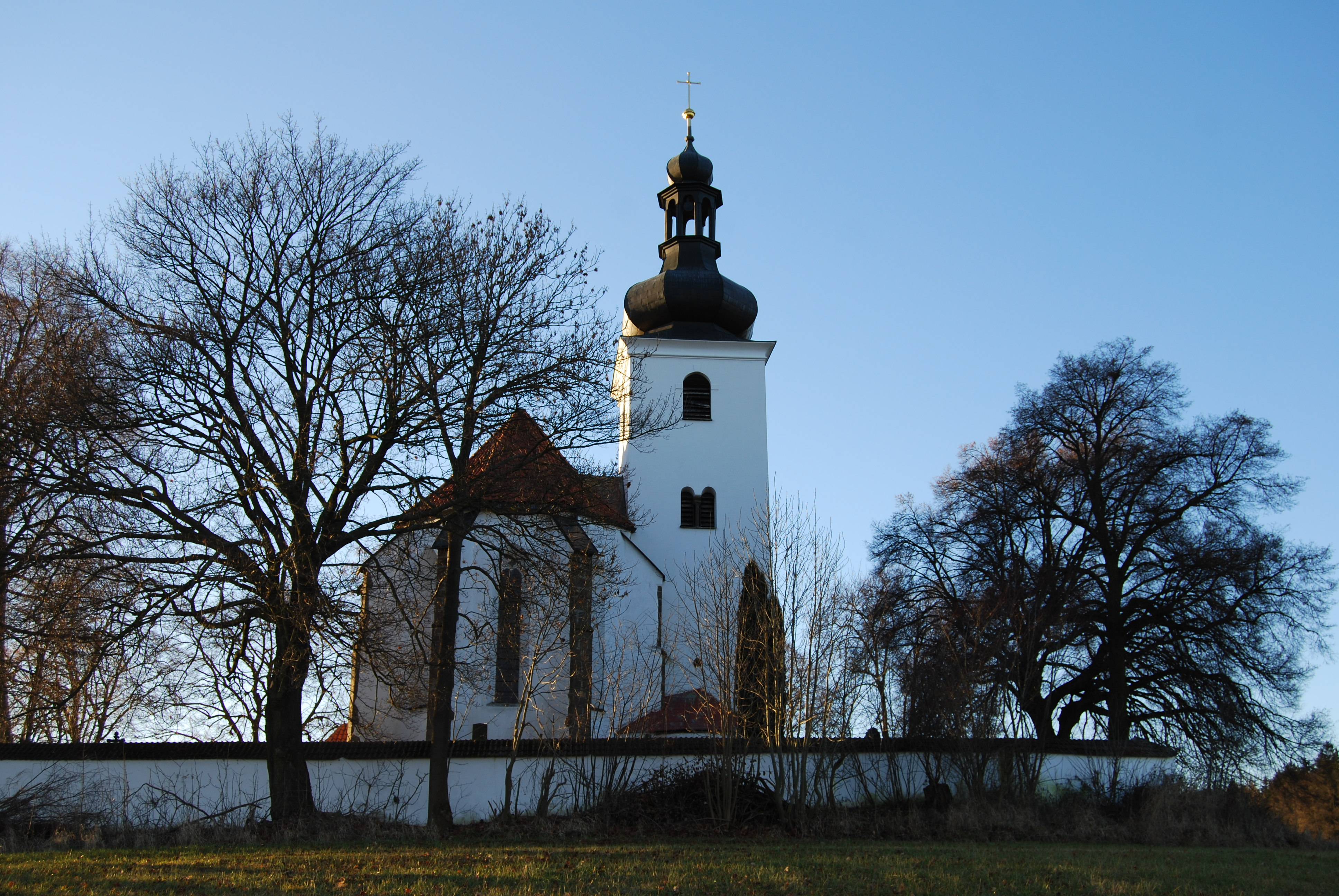 Kostel Narození Panny Marie. Nový Kostelec - část městyse Borotín v okrese Tábor. Čská republika.